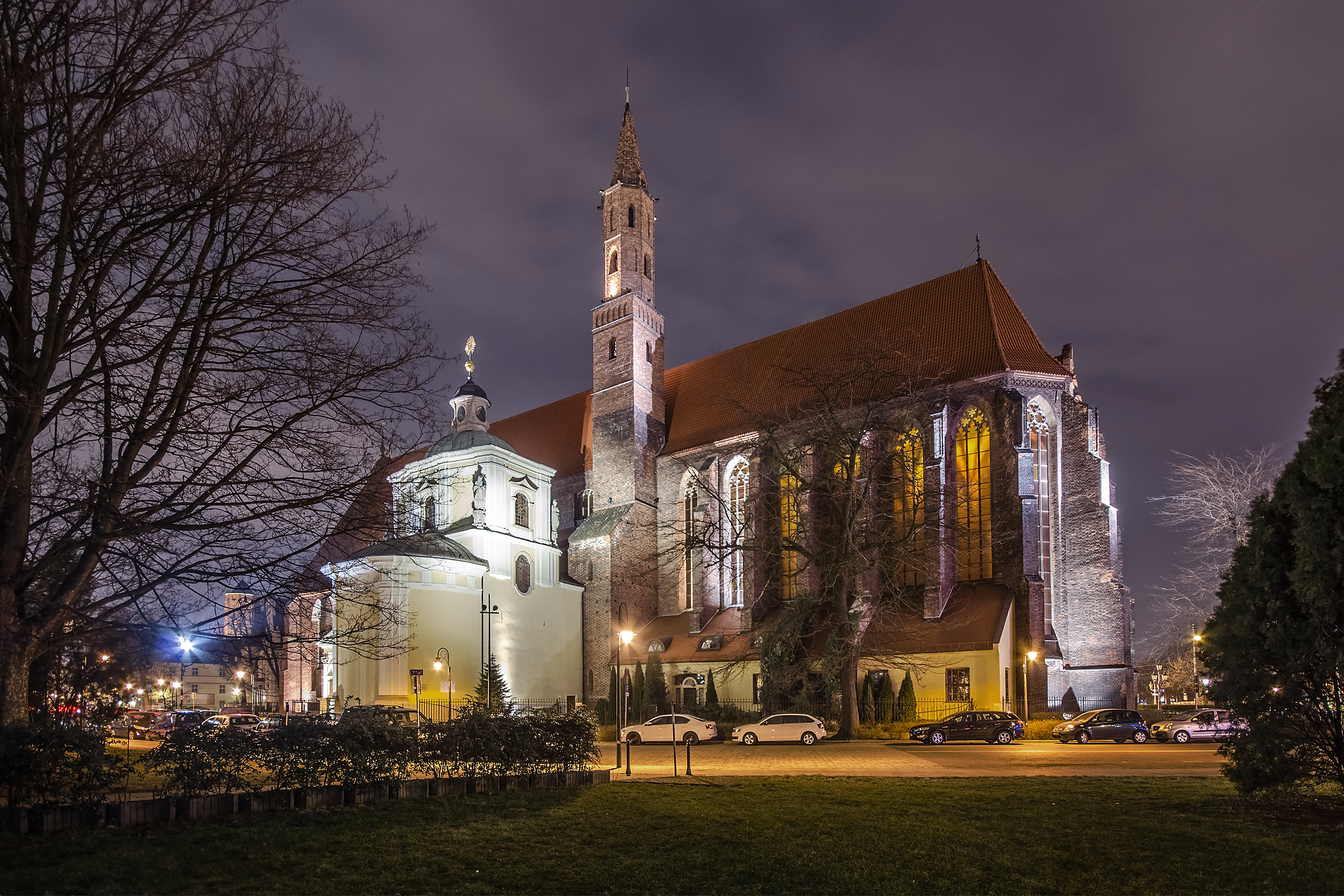 Wrocław Stare Miasto, pl. Nankiera 15 - dawny kościół św. Jakuba i Wincentego, obecnie katedra obrządku greckokatolickiego wraz z kaplicą Mariacką (Hochberga)